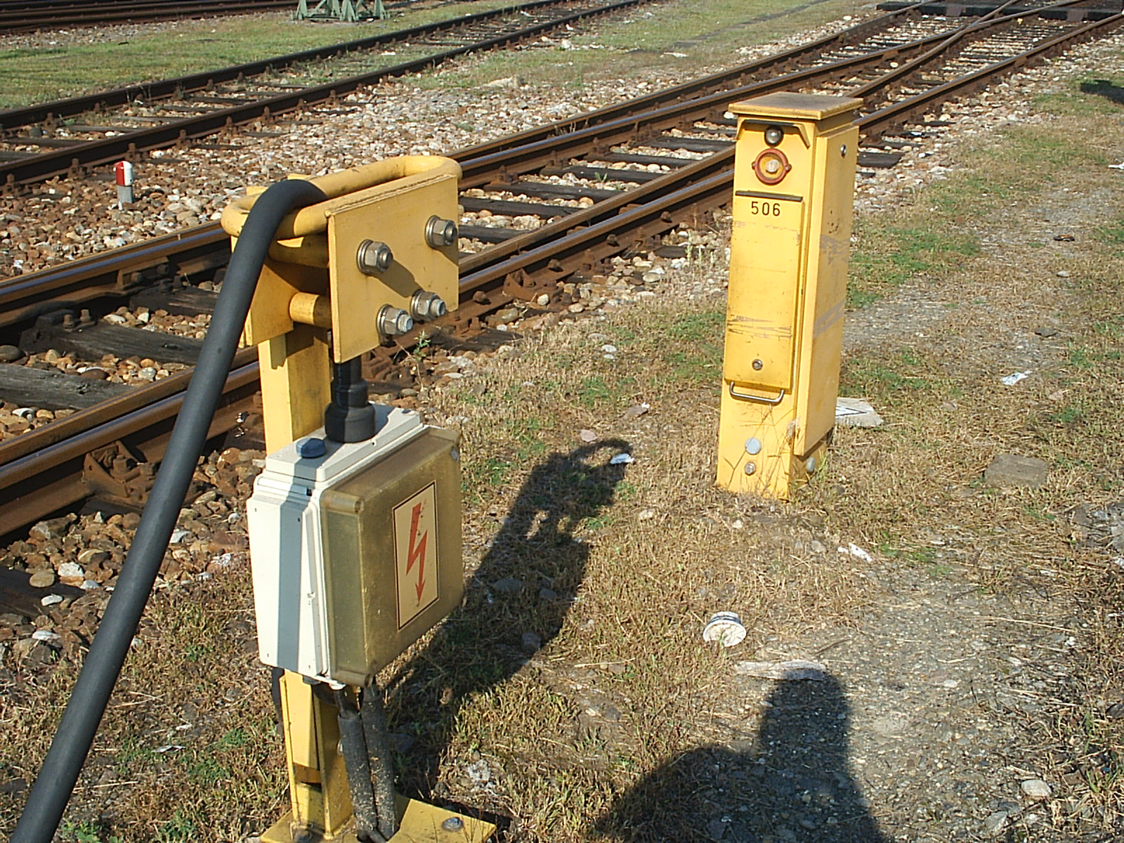 Dieses Bild zeigt eine Sollbruchstelle und rechts die Steuersäule einer Zugvorheizanlage in der Nähe des BW Basel Badischer Bahnhof.